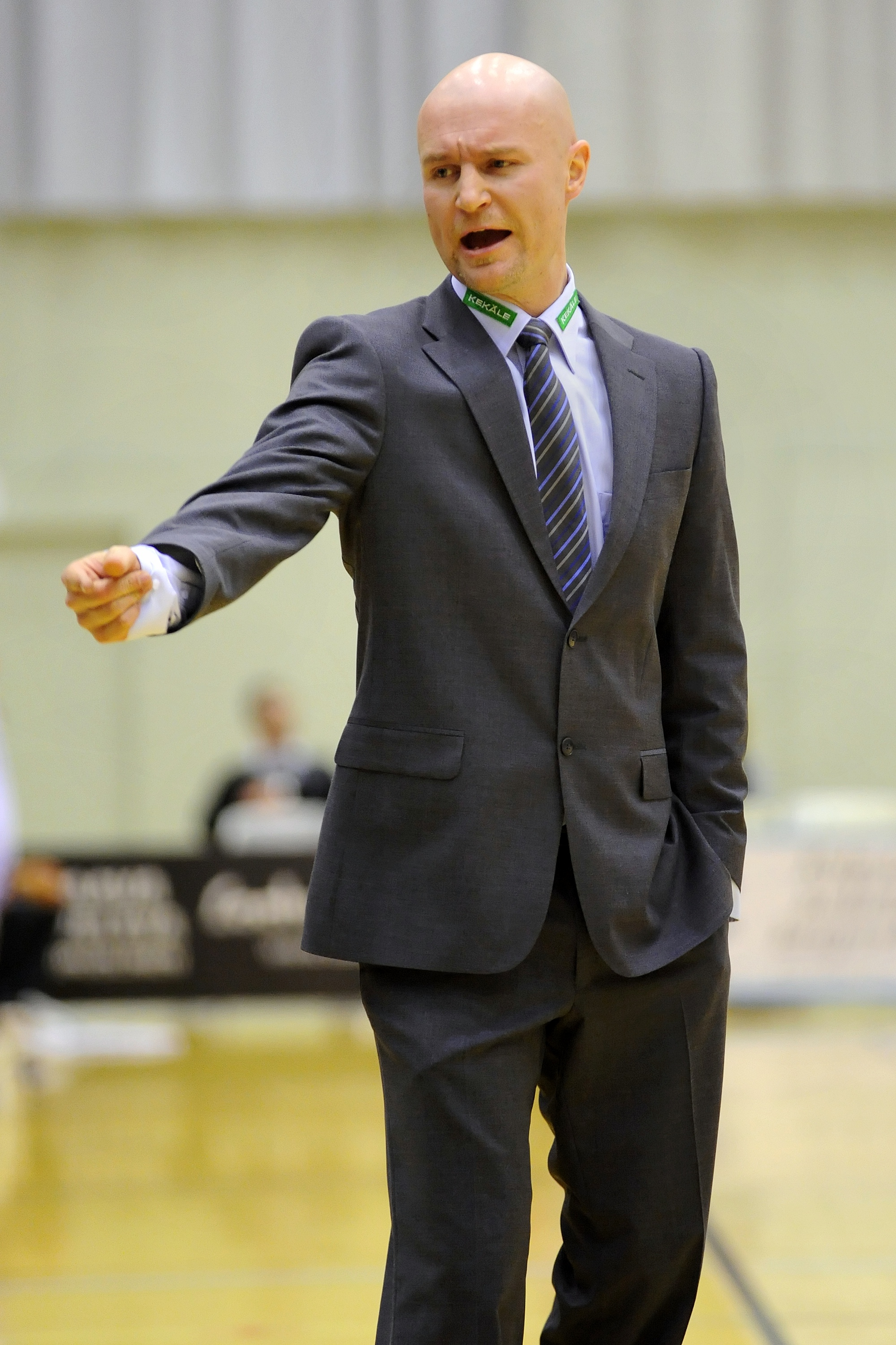 Koripallovalmentaja Jukka Toijala 30.10.2010 ottelussa Lappeenrannan NMKY - Joensuun Kataja.